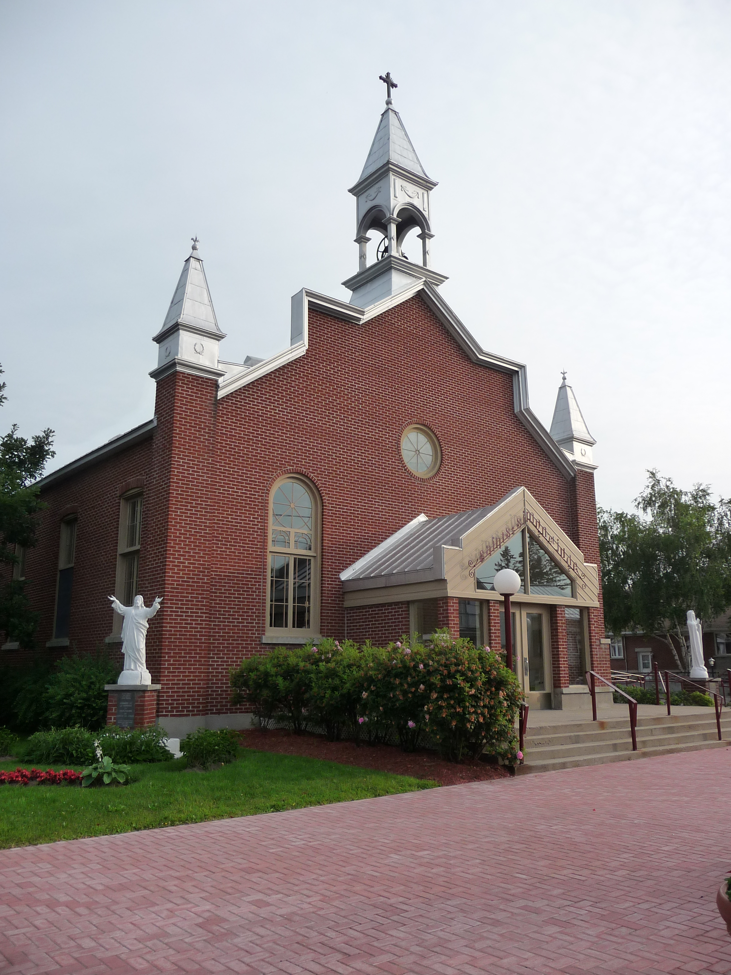 Église de Charlemagne en 2013.